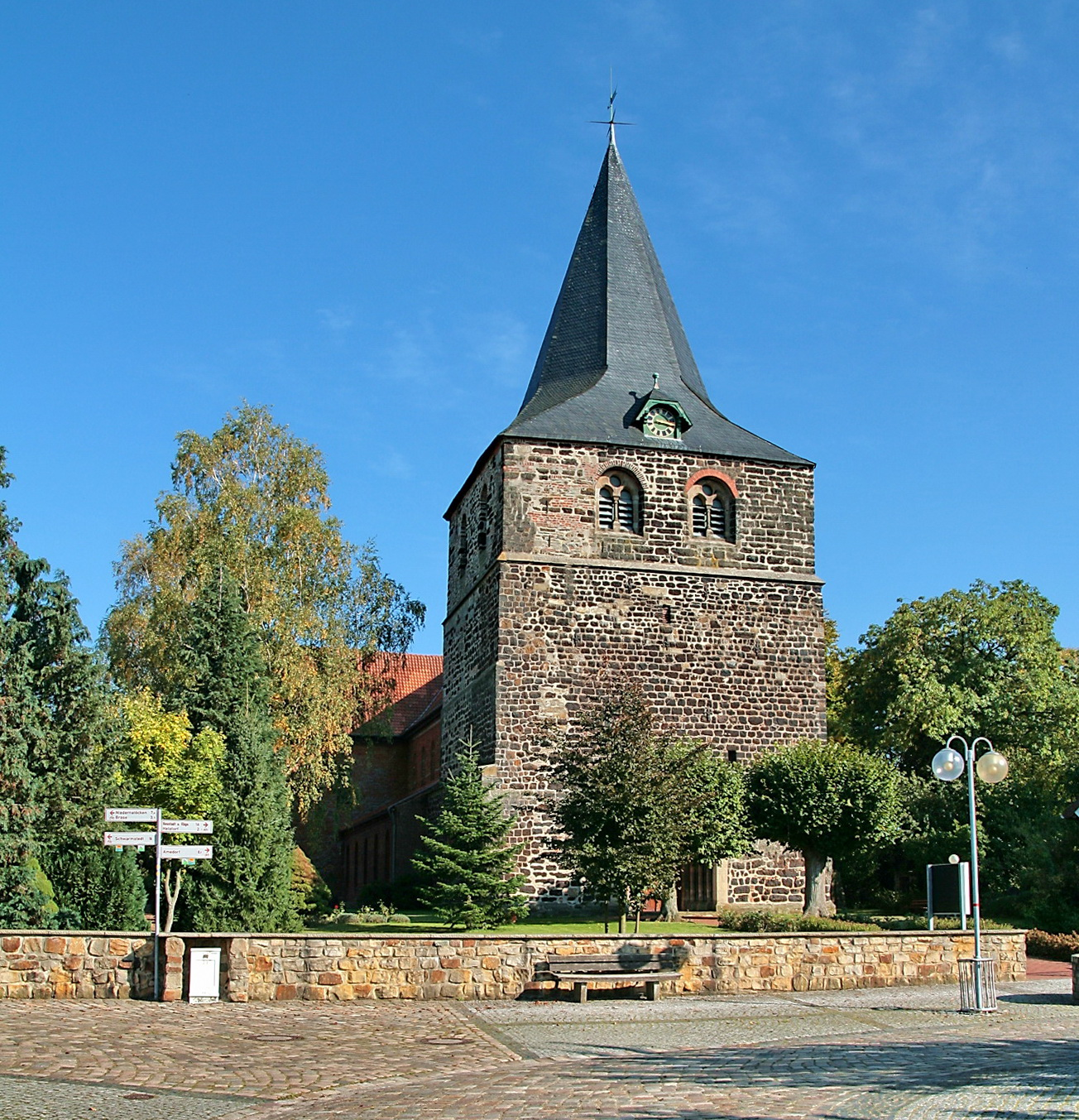 Die Backsteinbasilika St. Osdag in Mandelsloh (Neustadt am Rübenberge), Niedersachsen, Deutschland.